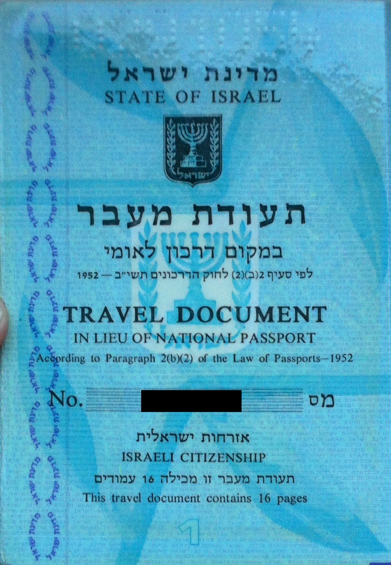 Первая страница "Проездного документа взамен национального паспорта" (ивр. Теудат Ма'авар), Израиль.